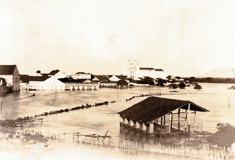 Foto da platéia do antigo Derby Clube Sobralense alagada pela cheia do Rio Acaraú em março de 1917.